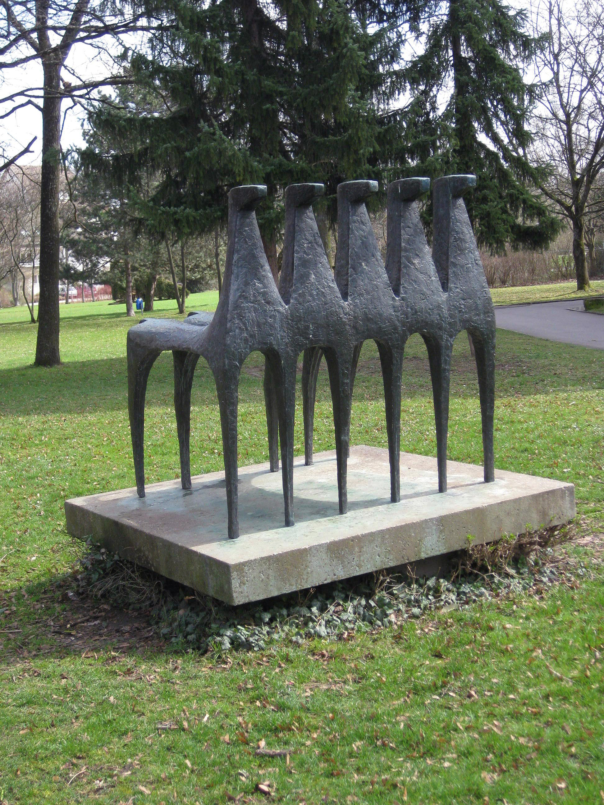 Seff Weidl, Quintilla (5 Pferde), 1966, Oberer See Böblingen, Deutschland